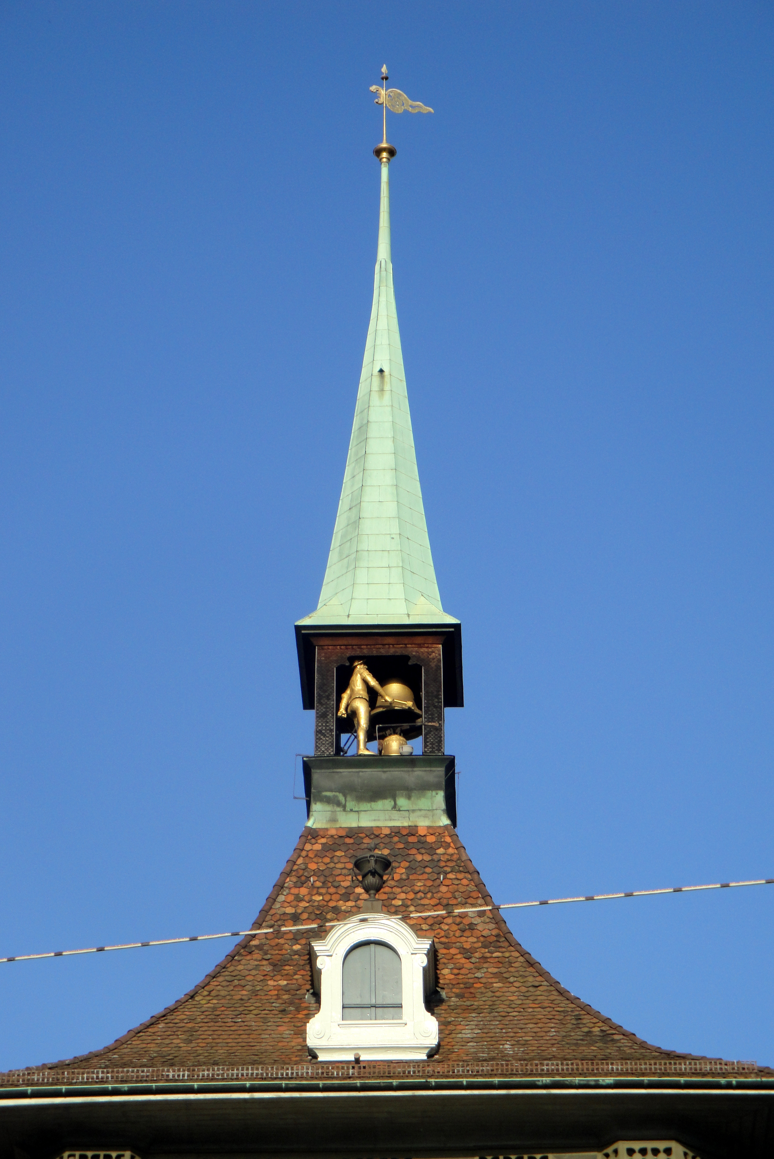 Bern, Zytglogge